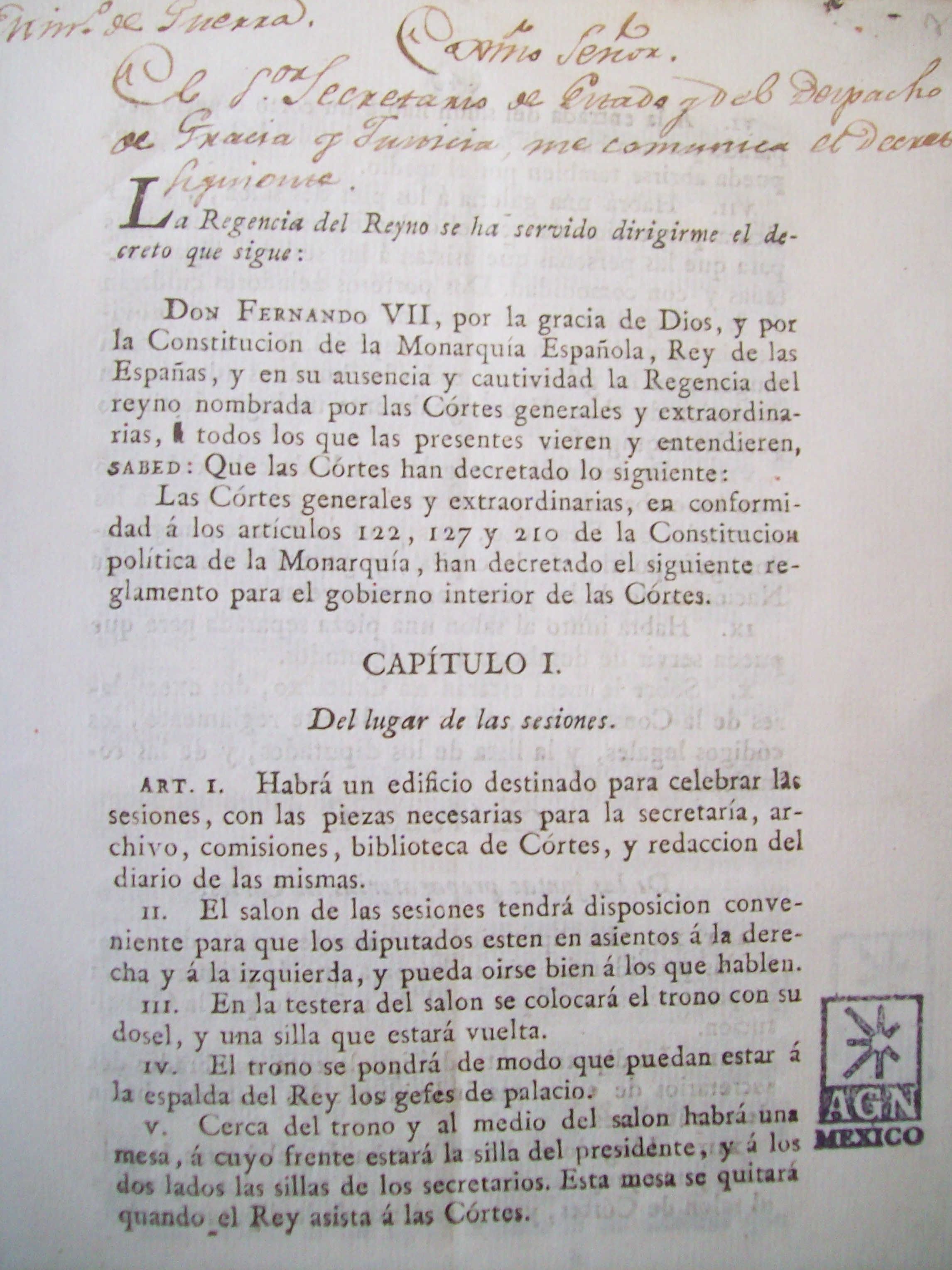 Reglamento de las Cortes de Cádiz, 1813. Archivo General de la Nación (México) Fuente: Memorias de la Revolución en México. N°5 (2009) ISBN 978-607-7748-00-7